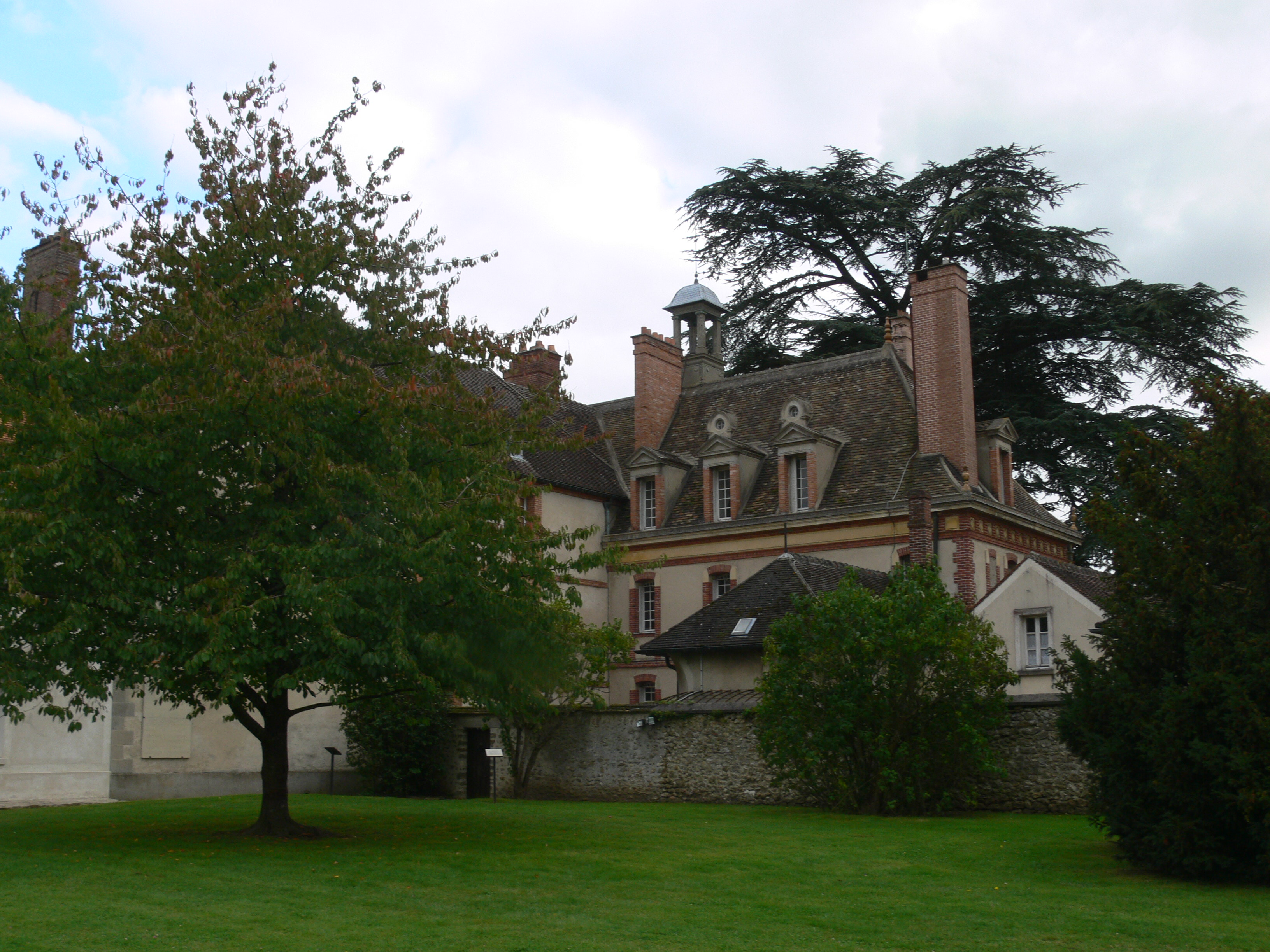 Port-Royal-des-Champs - Granges This building is en partie classé, en partie inscrit au titre des Monuments Historiques. .